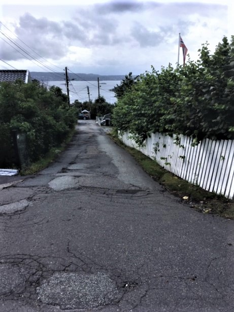 Sanatoriebakken Oslo august 2019